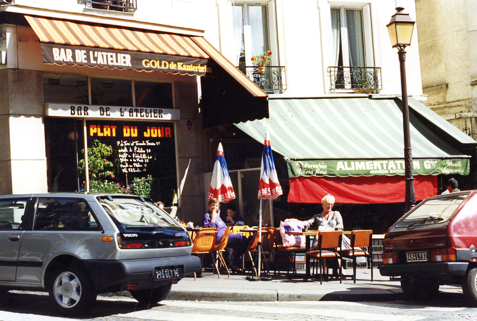 A restaurant, Paris, 1987.